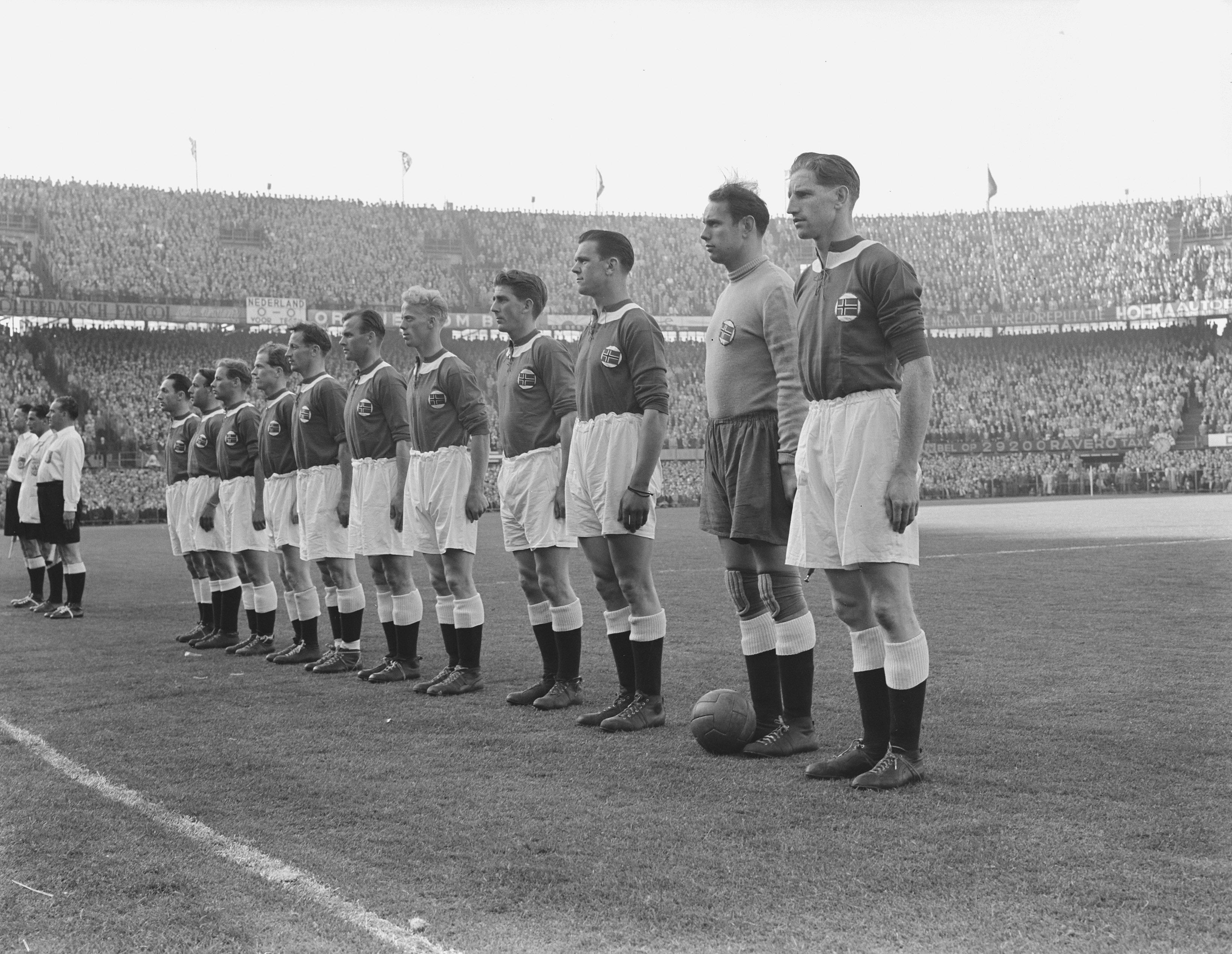 Collectie / Archief : Fotocollectie Anefo Reportage / Serie : [ onbekend ] Beschrijving : Nederland tegen Noorwegen Rotterdam Noors elftal Datum : 6 juni 1951 Trefwoorden : elftallen Fotograaf : Noske, J.D. / Anefo Auteursrechthebbende : Nationaal Archief Materiaalsoort : Glasnegatief Nummer archiefinventaris : bekijk toegang 2.24.01.09 Bestanddeelnummer : 904-6047